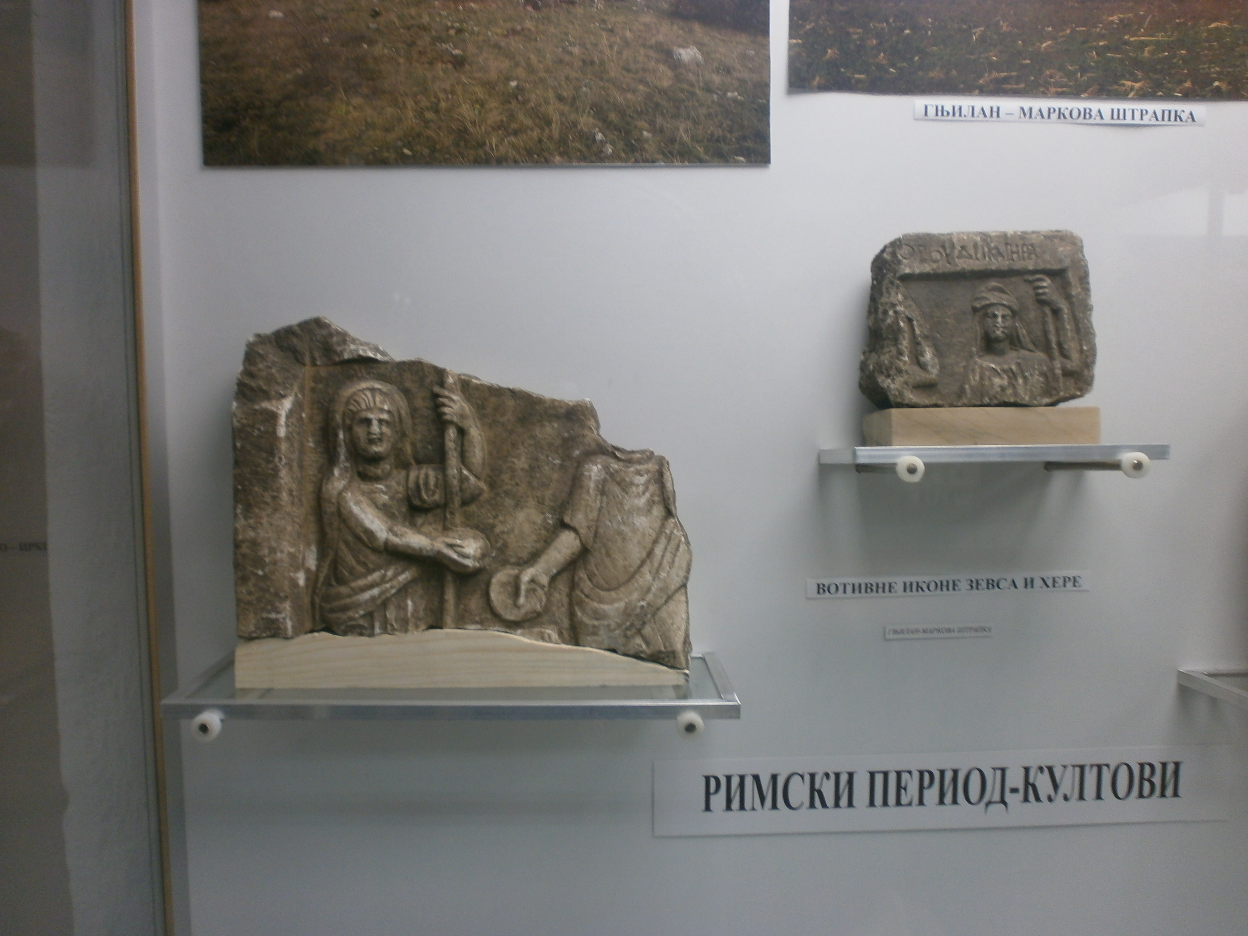 Srpski (latinica): Pirotski grad, Pirot